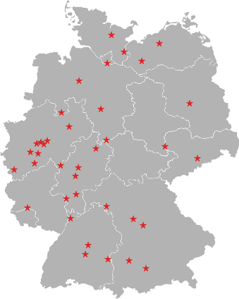 Diese Karte zeigt die Ortsgruppen der SDAJ in Deutschland.